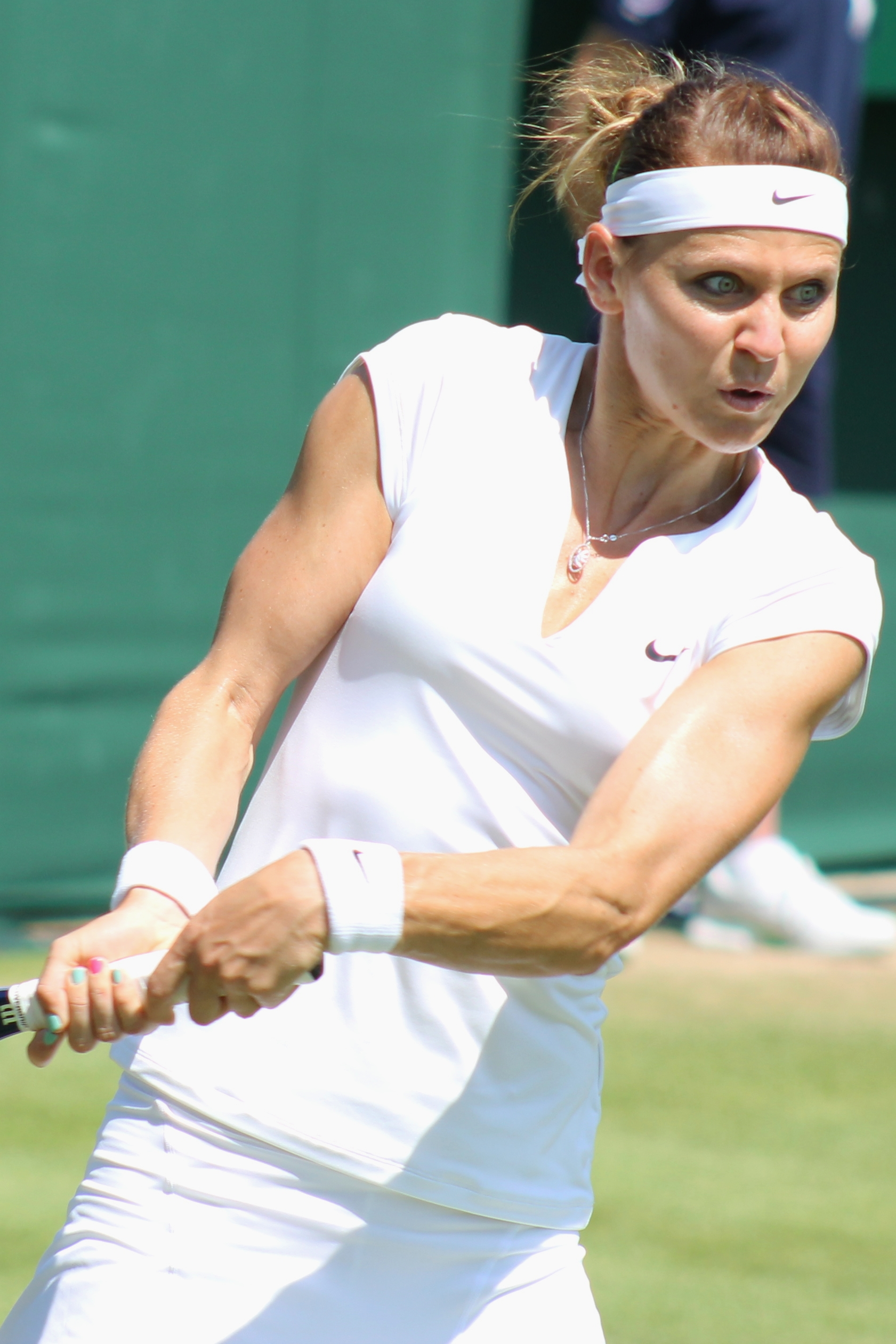 Safarova WM15 (3)